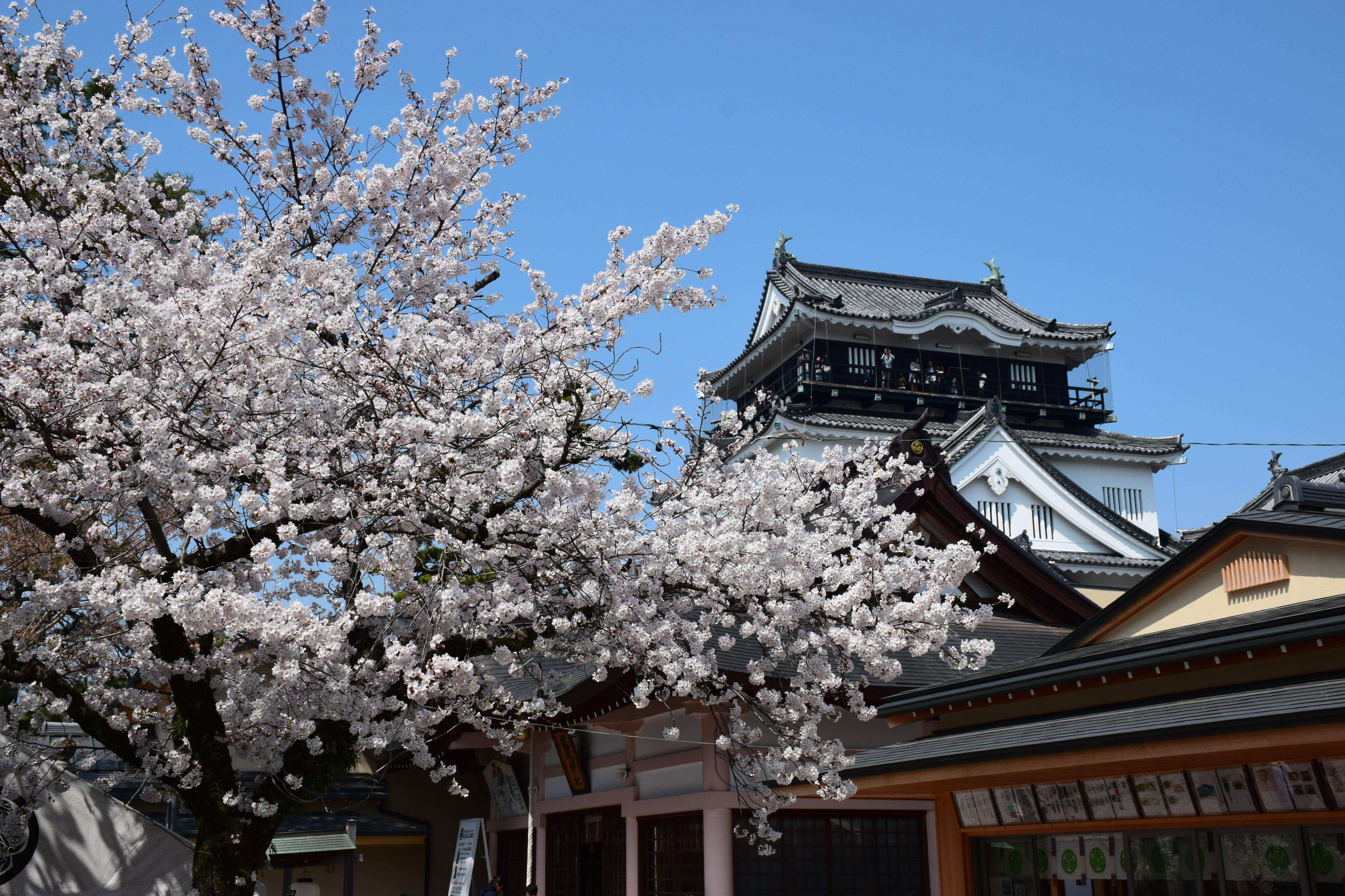 岡崎城天守閣